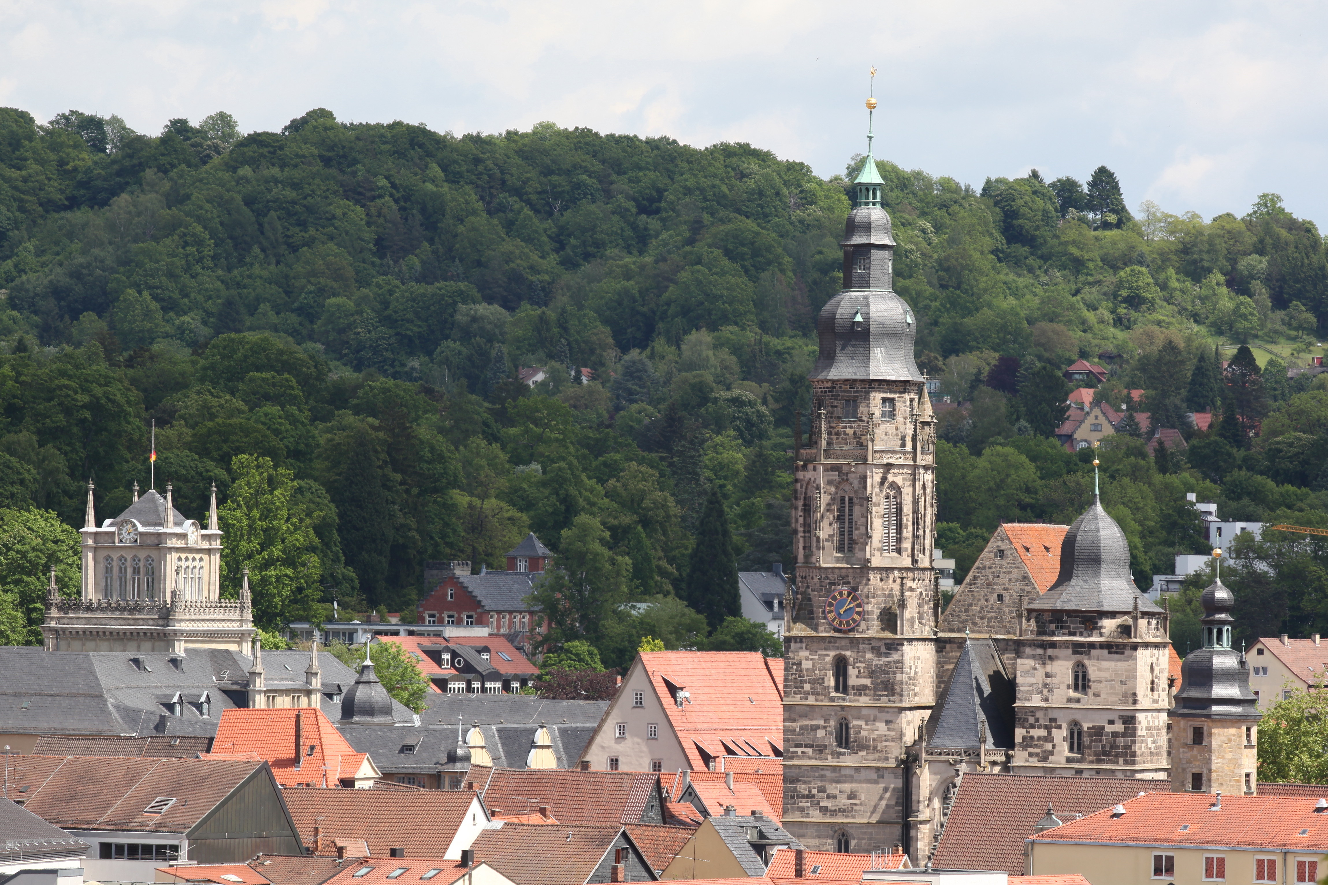 Türme der Morizkirche Coburg